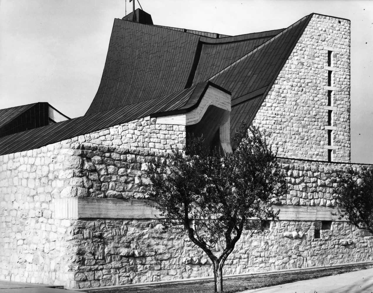 Servizio fotografico : Firenze, 1977 / Paolo Monti, Istituto di fotografia Paolo Monti. - Stampe: 3 : Positivo b/n, gelatina bromuro d'argento/ carta, 18x24, 24x30. - ((Al verso delle stampe manoscritti i numeri dei negativi corrispondenti con indicazione del fotogramma (nel formato 35 mm): 14200 [il negativo risulta mancante], 14202, 2916bis/16; iscrizioni didascaliche manoscritte a matita e a penna; timbri a inchiostro con copyright (Corso Sempione - Milano) e "Istituto di Fotografia Paolo Monti". - Sul coperchio della scatola iscrizione didascalica manoscritta a pennarello nero: "Architett. Moderna". - Fonte: Agenda di Paolo Monti: Leica 1501-3000 Controllo numerazione (1950-1978), presso Archivio Paolo Monti. - Fonte: Fattura di Paolo Monti: IV. Commesse/ Fattura n. 05/ Fotografie per volume architetto veneziano Codussi - Prof. Puppi (1977/03/31), presso Archivio Paolo Monti. - Fonte: Rubrica di Paolo Monti: Archivio fino 1-4-1961/ 31-3-1963 (1961-1963), presso Archivio Paolo Monti. - Fonte: Agenda di Paolo Monti: Monti/ 3 aprile 1966 - 9 marzo 1971/ 12421-16823 (1966-1971), presso Archivio Paolo Monti. - Fonte: Monografia di Fleming John, Honour Hugh, Pevsner Nikolaus: Dizionario d'architettura, Torino, Einaudi (1981). - Fonte: Monografia di Koenig, Giovanni Klaus: Architettura in Toscana, 1931-1968, Torino, ERI, 1968 (1968)